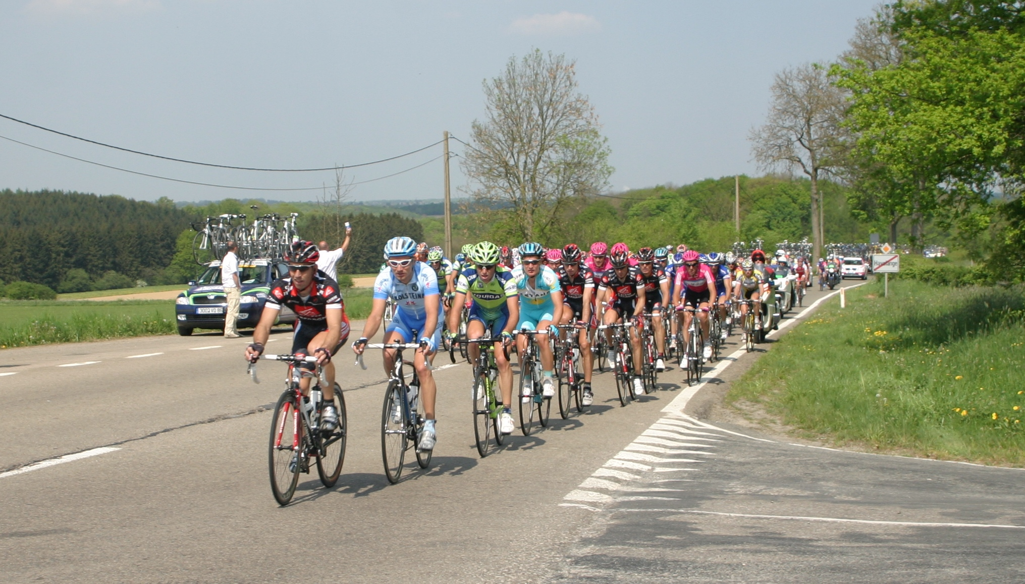 Flèche Wallonne 2007. De Pleton zu Havelange um Km 117.